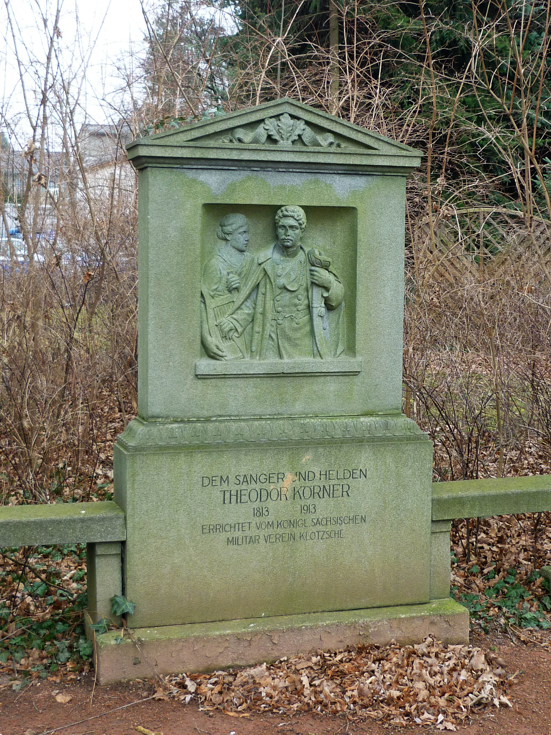 Körnerdenkmal Kieler Str. in Dresden-Klotzsche